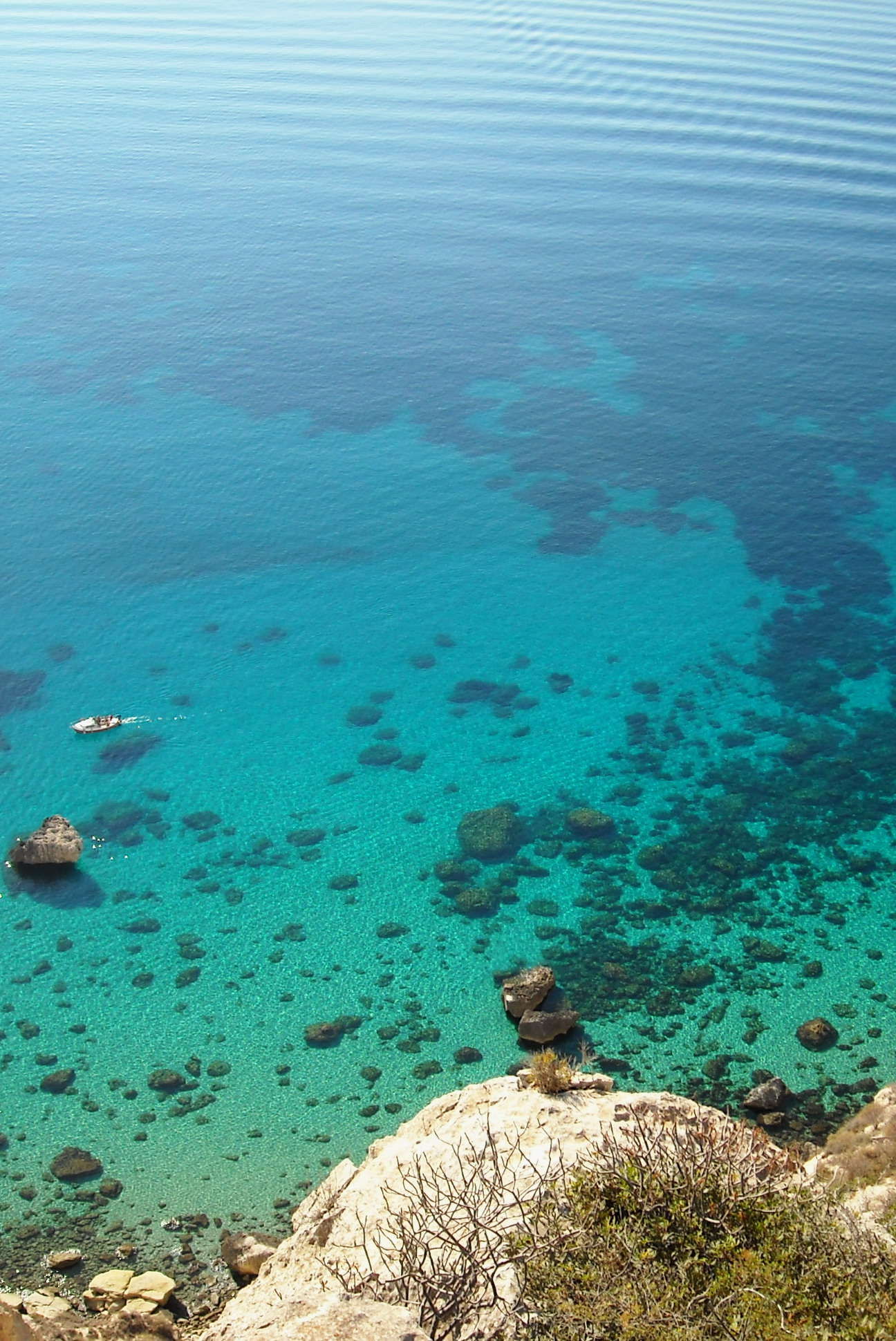 Dietro la sella del Diavolo